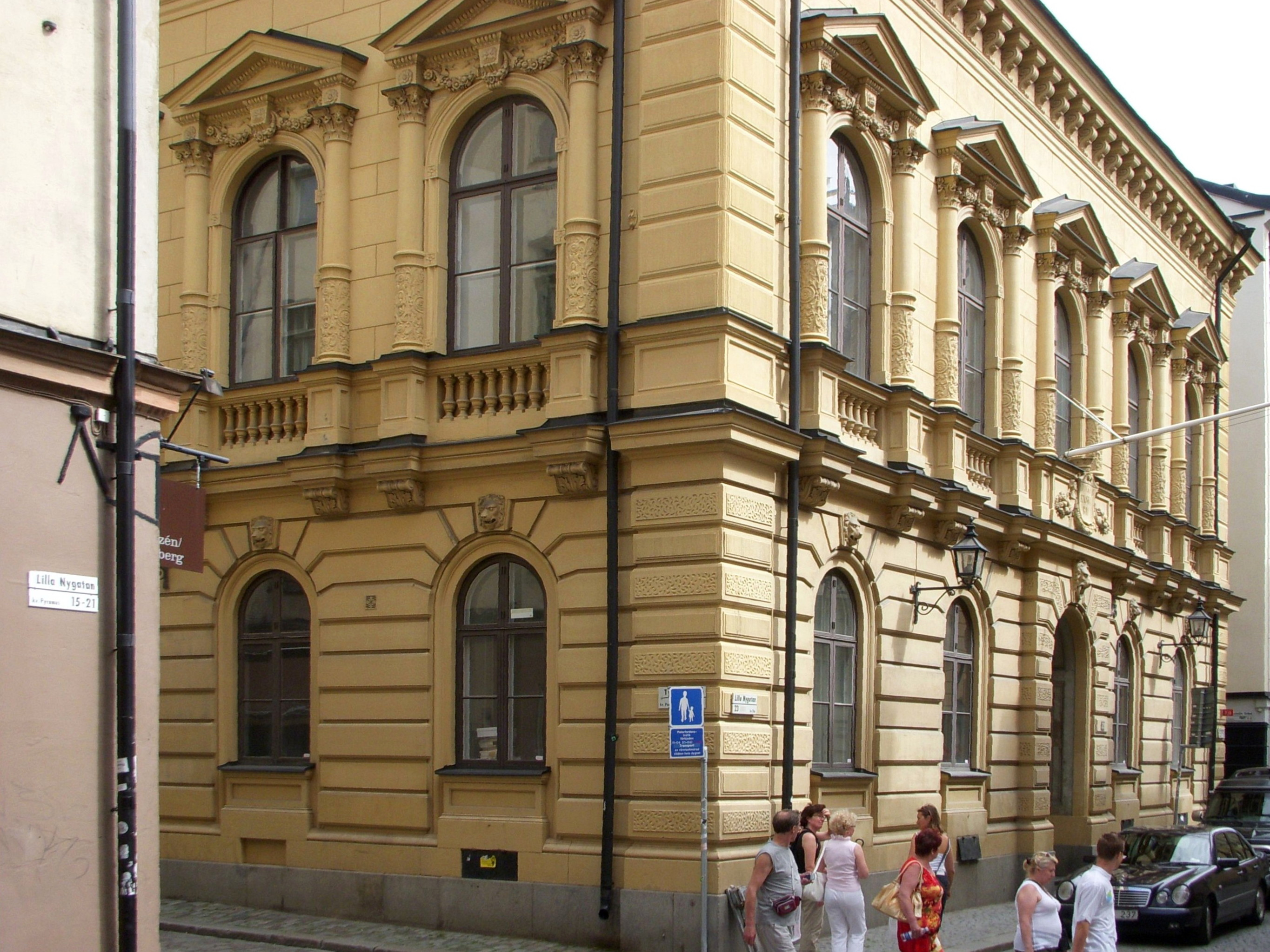 Stockholms Enskilda Bankens byggnad i Gamla stan